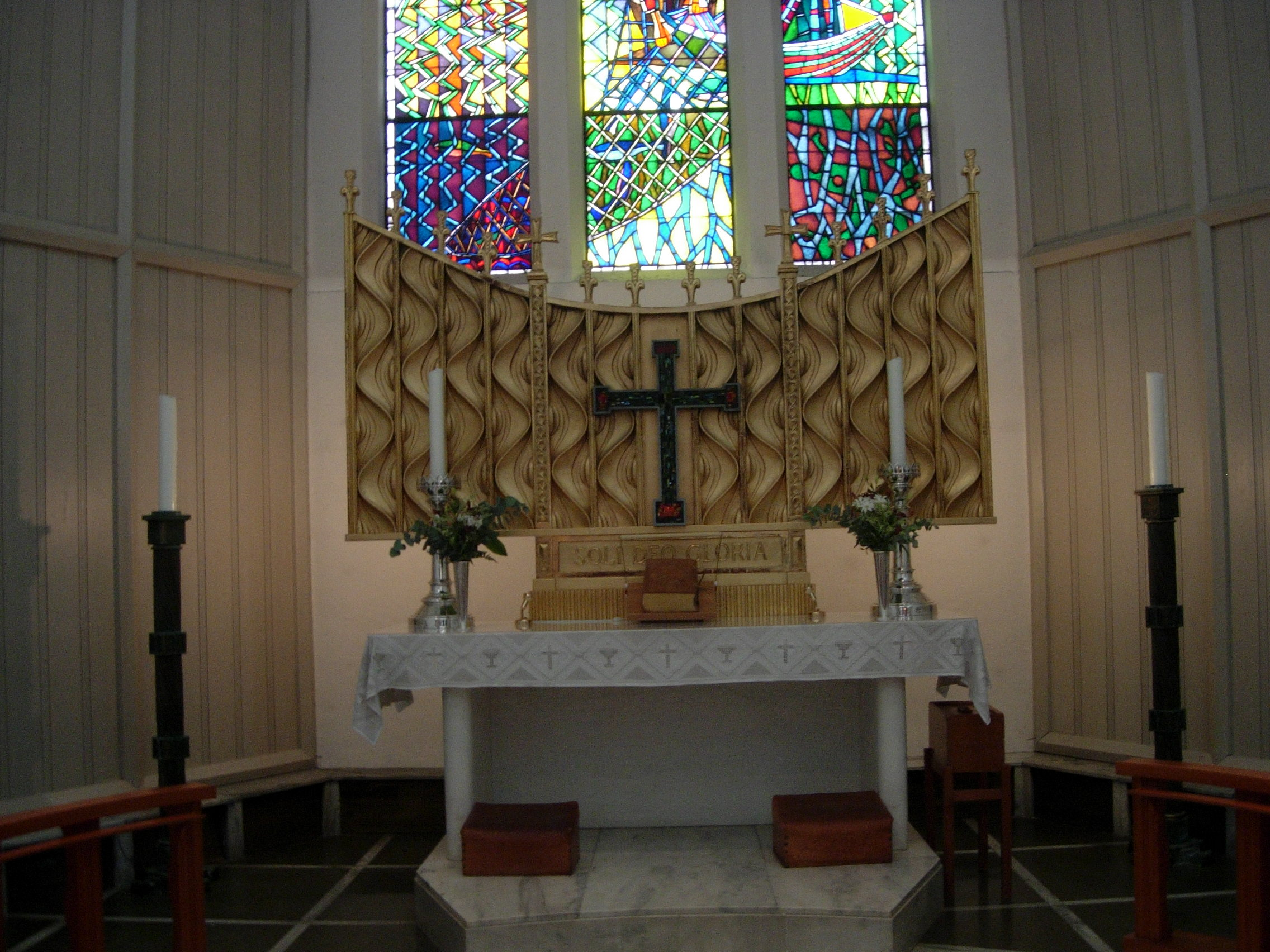 Alteret i Bodø domkirke